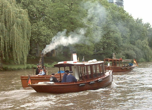 Dampfboote auf dem Neckar